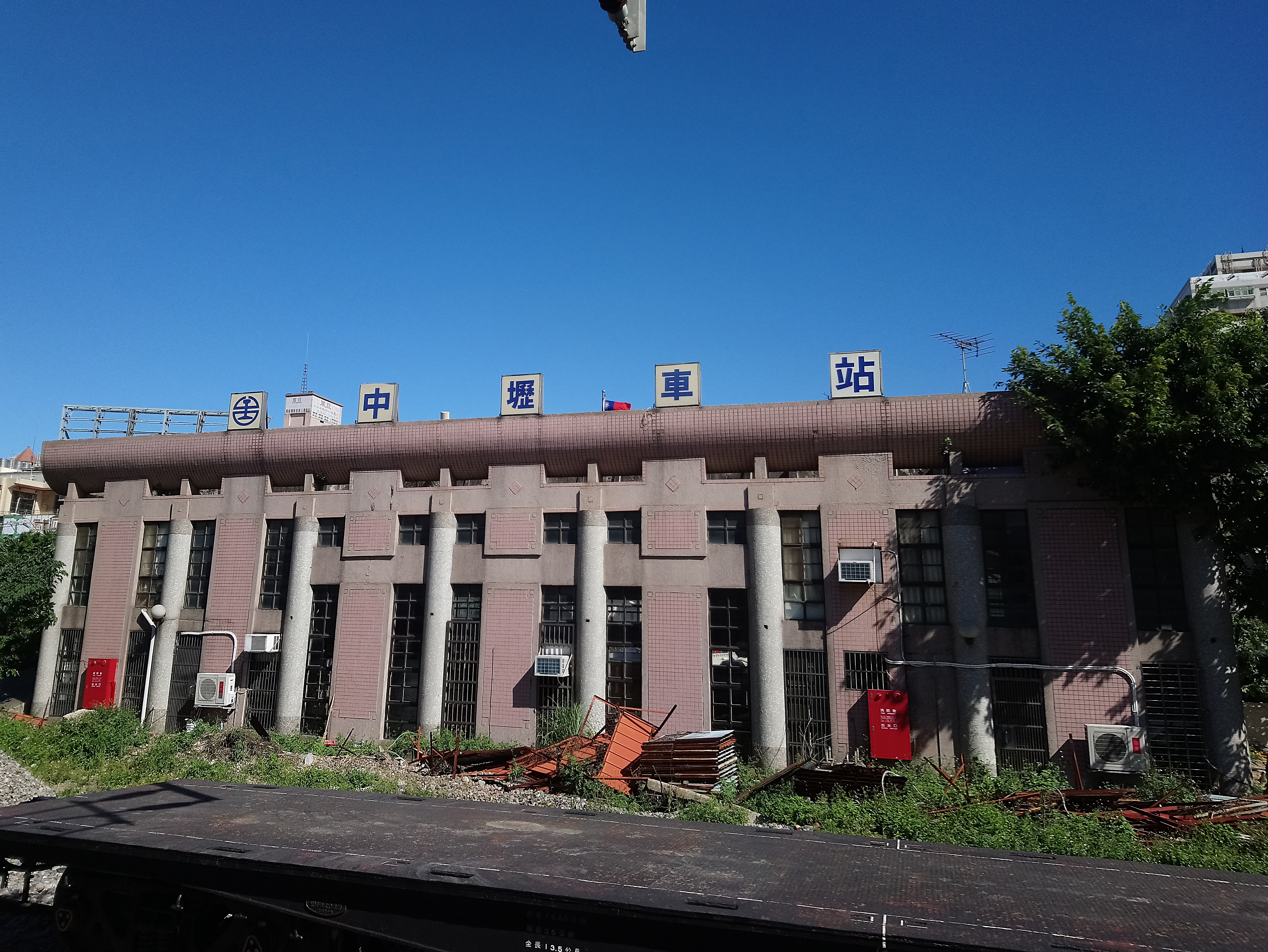 由月台看臺鐵中壢車站後站,桃園市中壢區石頭里